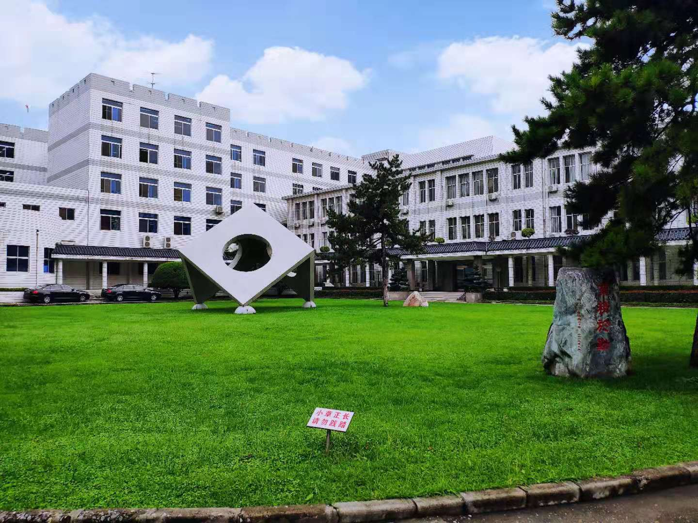 中文（中国大陆）: 西安理工大学校工会